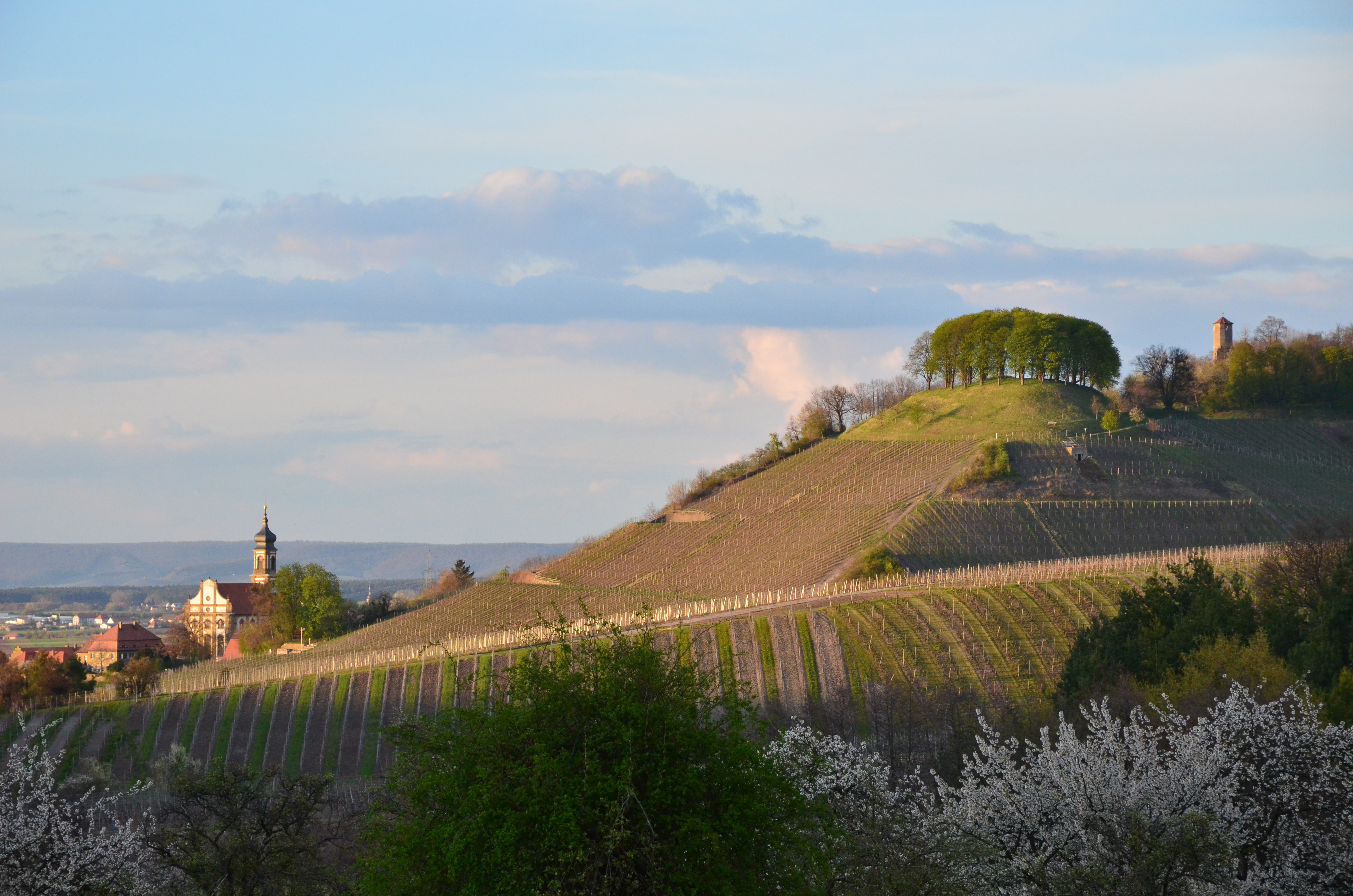 Castell Kirche und Schloßberg mit Turm